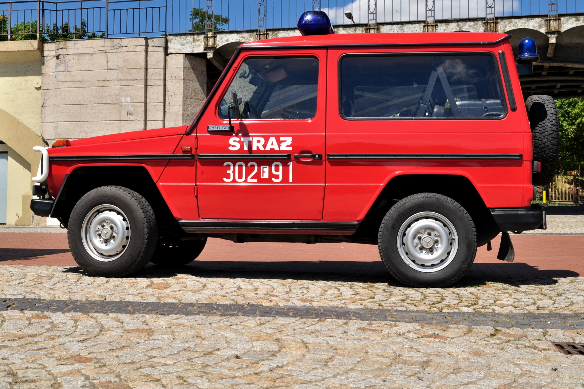 Mercedes 290GD, nr operacyjny 302[F]91 z Jednostki Ratowniczo-Gaśniczej nr 2 PSP w Gorzowie Wlkp. - samochód operacyjny.